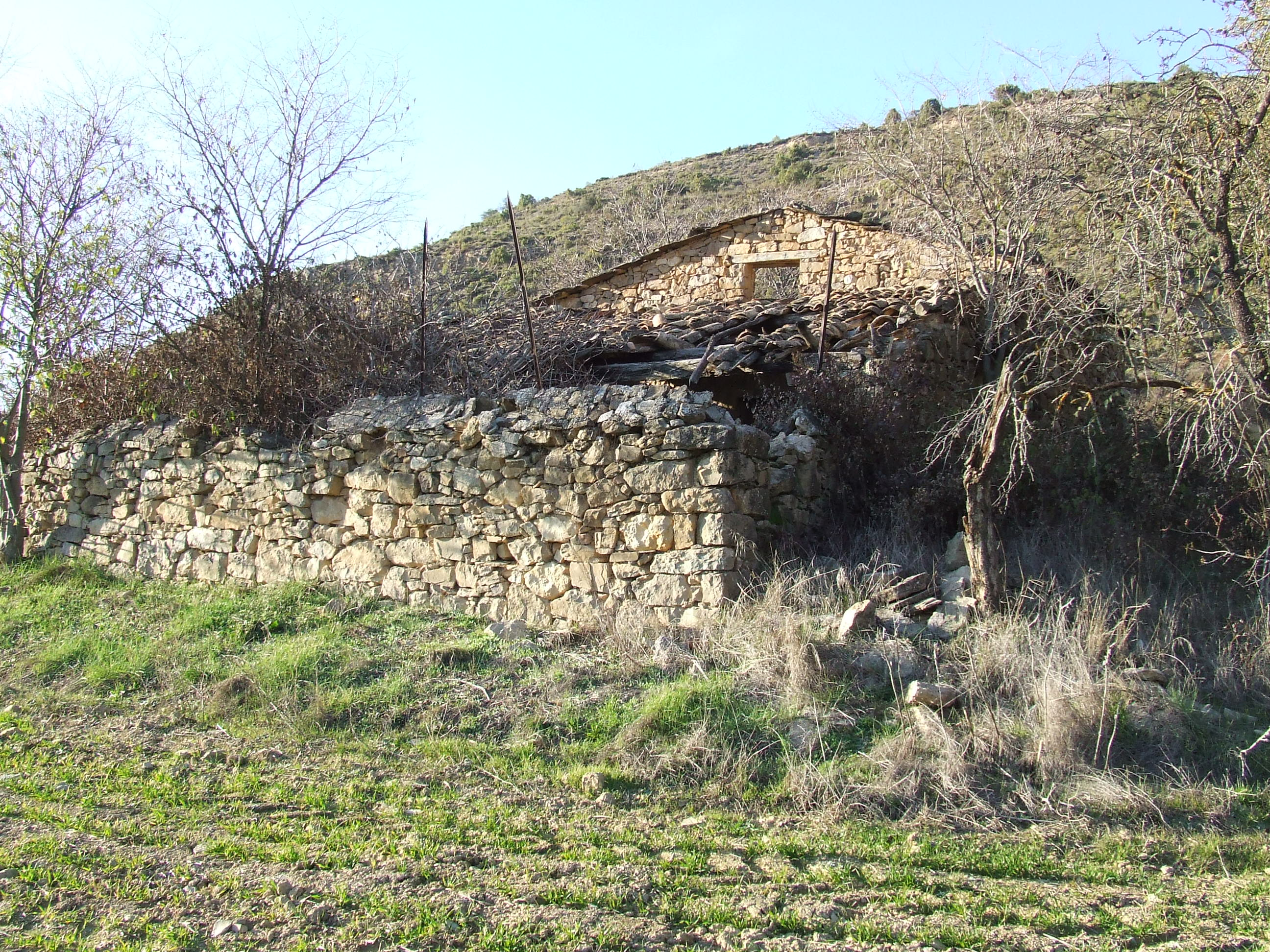 El Corral del Castelló (Abella de la Conca, Pallars Jussà)